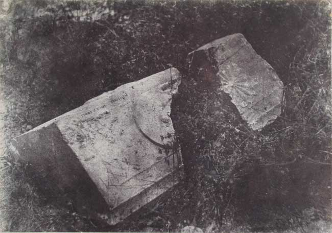 Fragments d'un sarcophage, Tombeau du Rois de Juda - Jerusalem.